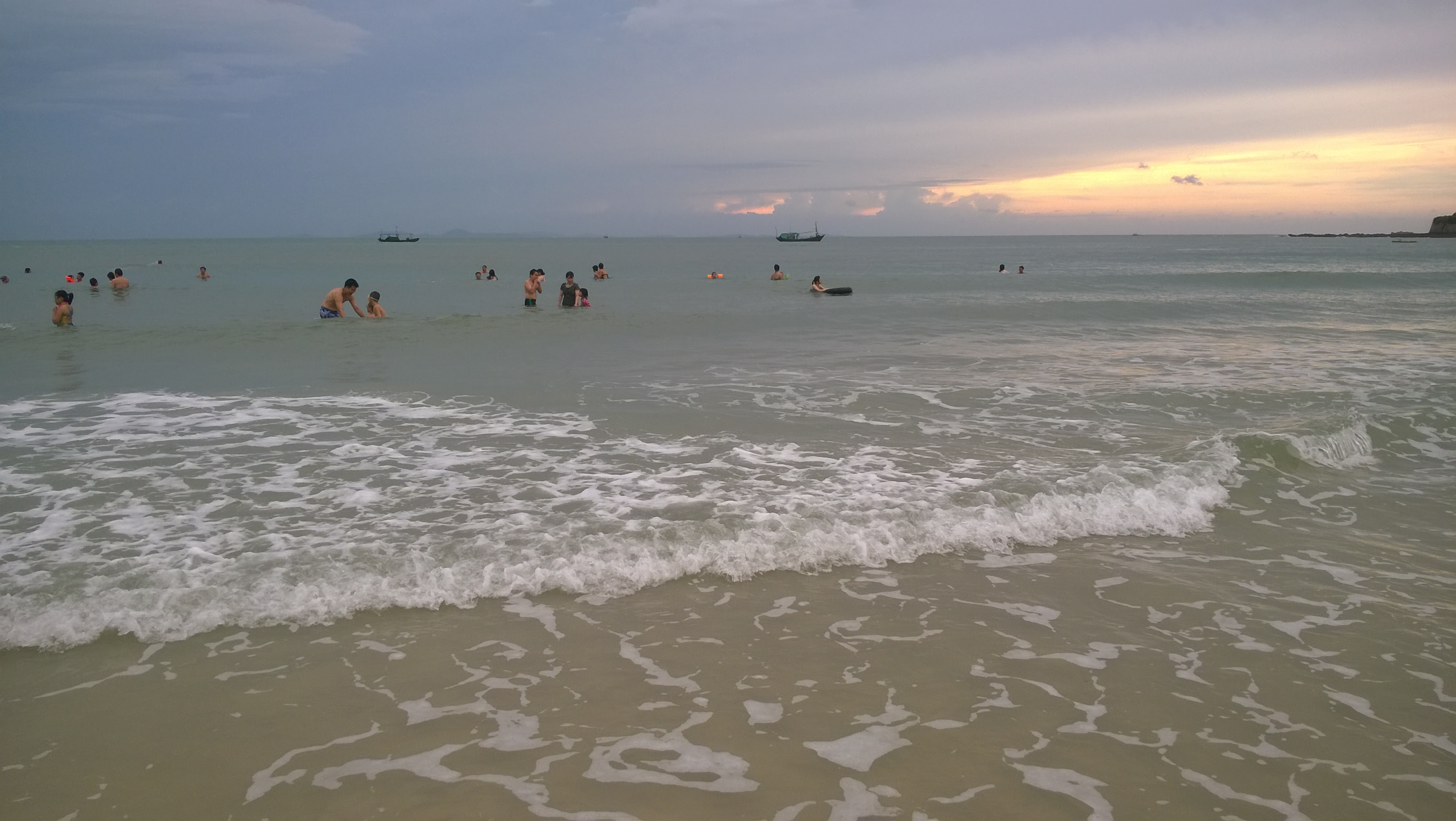 Bãi tắm Thủy Triều ở đảo Cồn Nổi, Kim Sơn, Ninh Bình